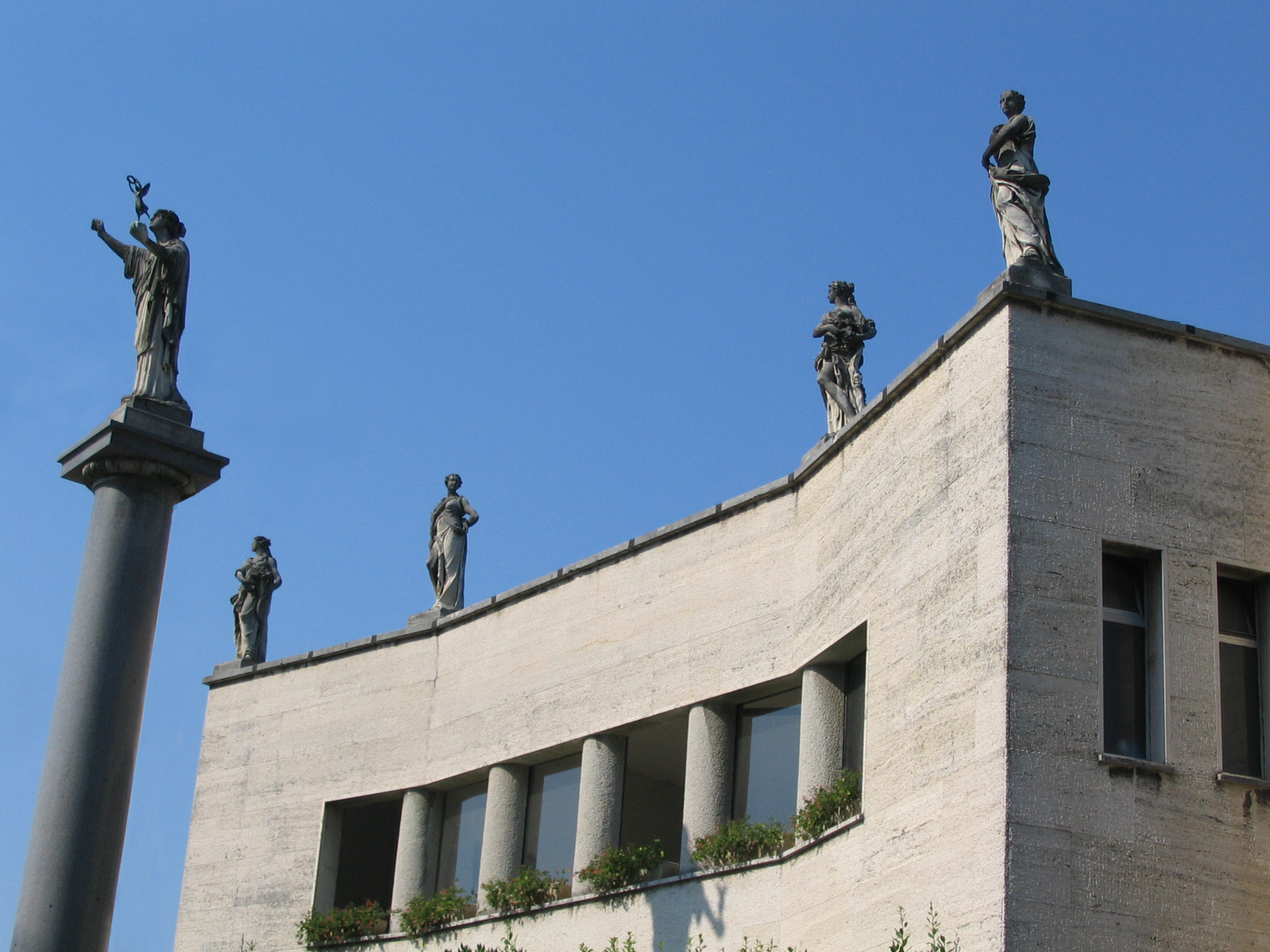 Autore Giorces. Missaglia, particolare del Municipio, opera dell'arch. Paolo Caccia Dominioni.